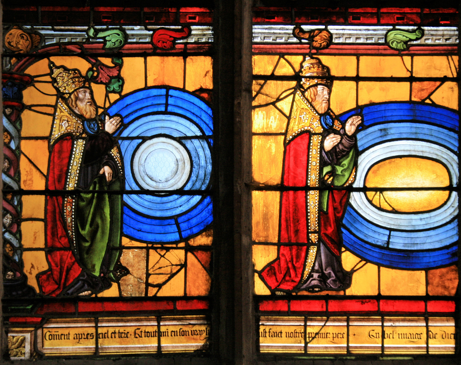 Église Sainte-Madeleine, Troyes, Aube, France